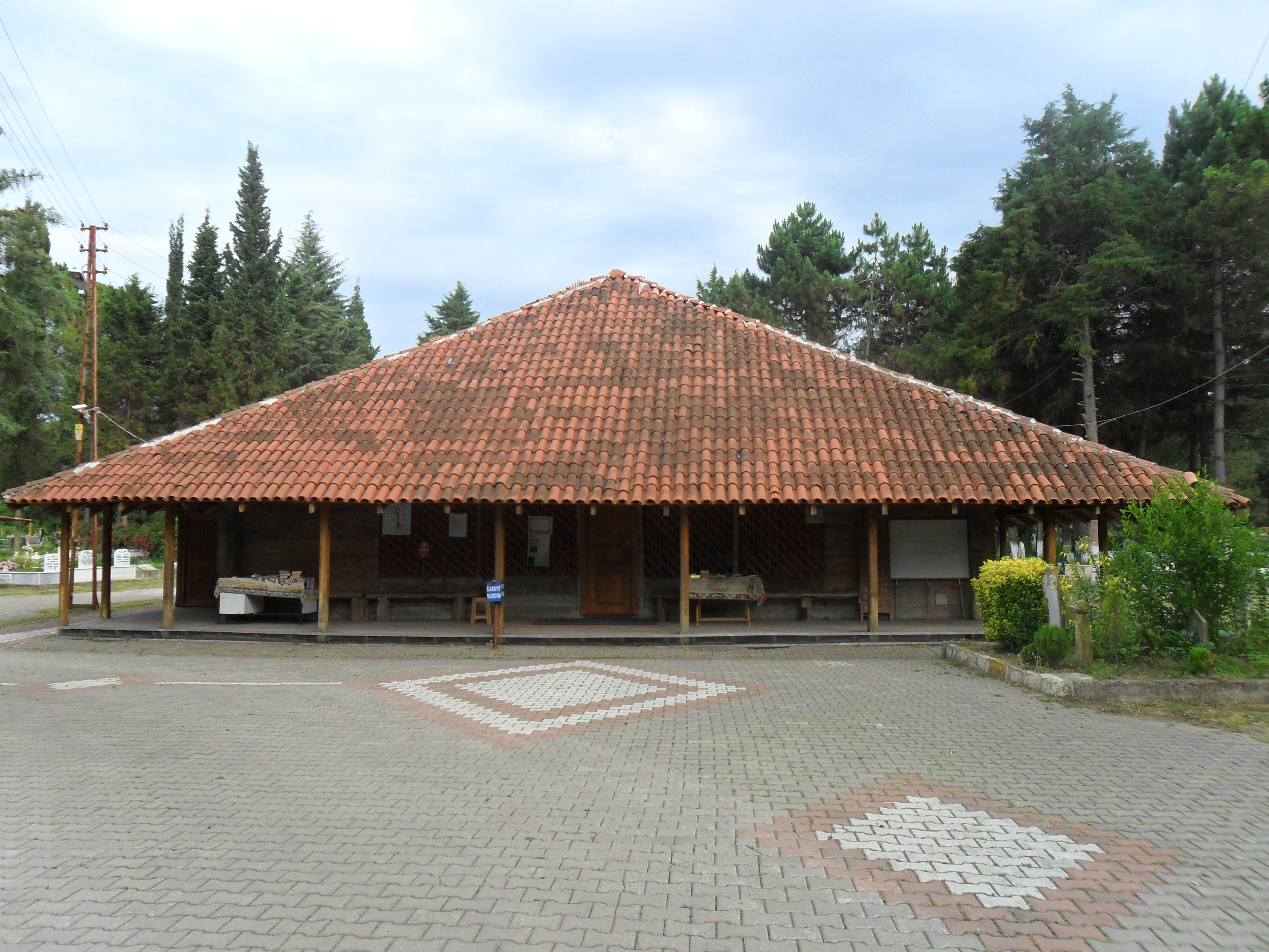 Samsun'un Çarşamba ilçesindeki Göğceli Mezarlığı içerisinde yer alan Göğceli Camii'nin giriş kısmından bir görünümü.